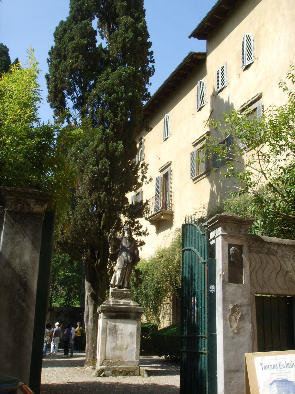 Palazzo di San Francesco di Paola, ingresso